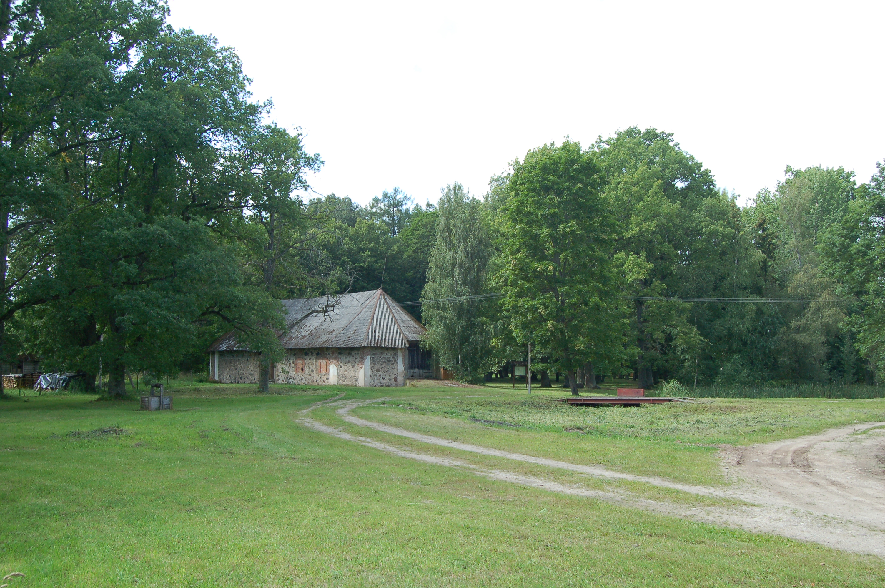 Vaade pargile peahoone eest Autor: Mart Raudsaar